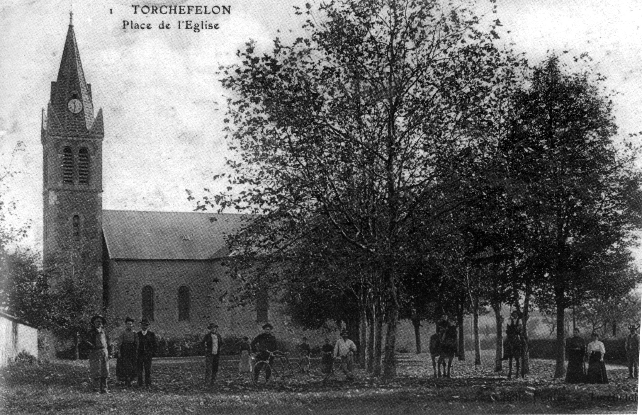 Torchefelon, place de l'église, en 1912